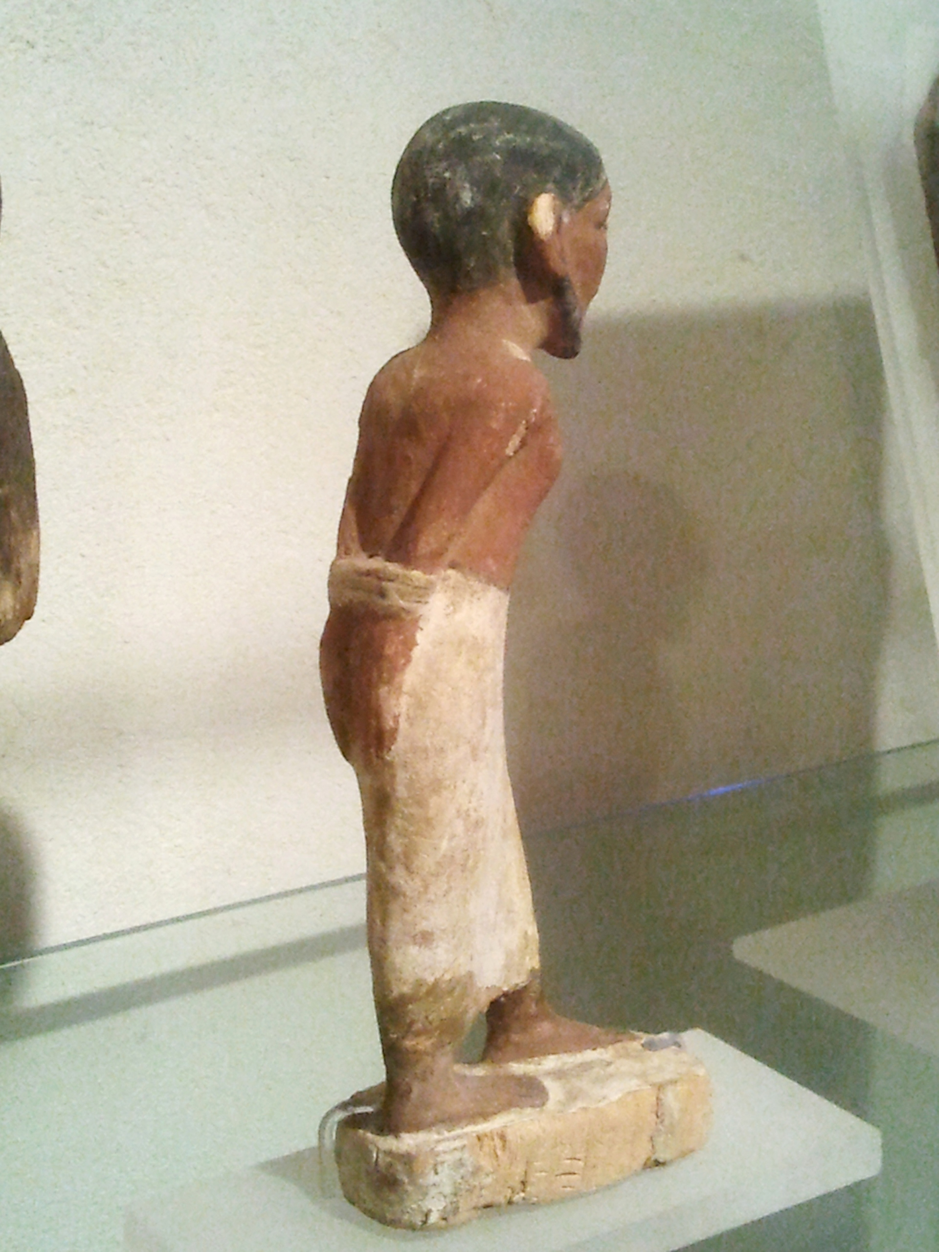 צלמית של שבוי שמי, ידיו קשורות מאחור, ממצרים העתיקה. אסף מוזיאון הכט